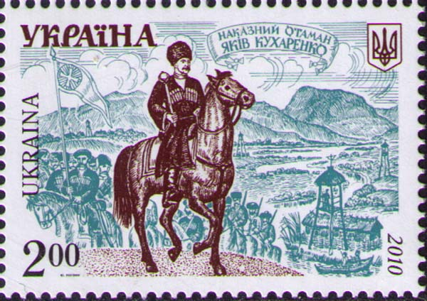 Наказний отаман Яків Кухаренко. Поштова марка України 2010 р. з серії «Історія війська в Україні».